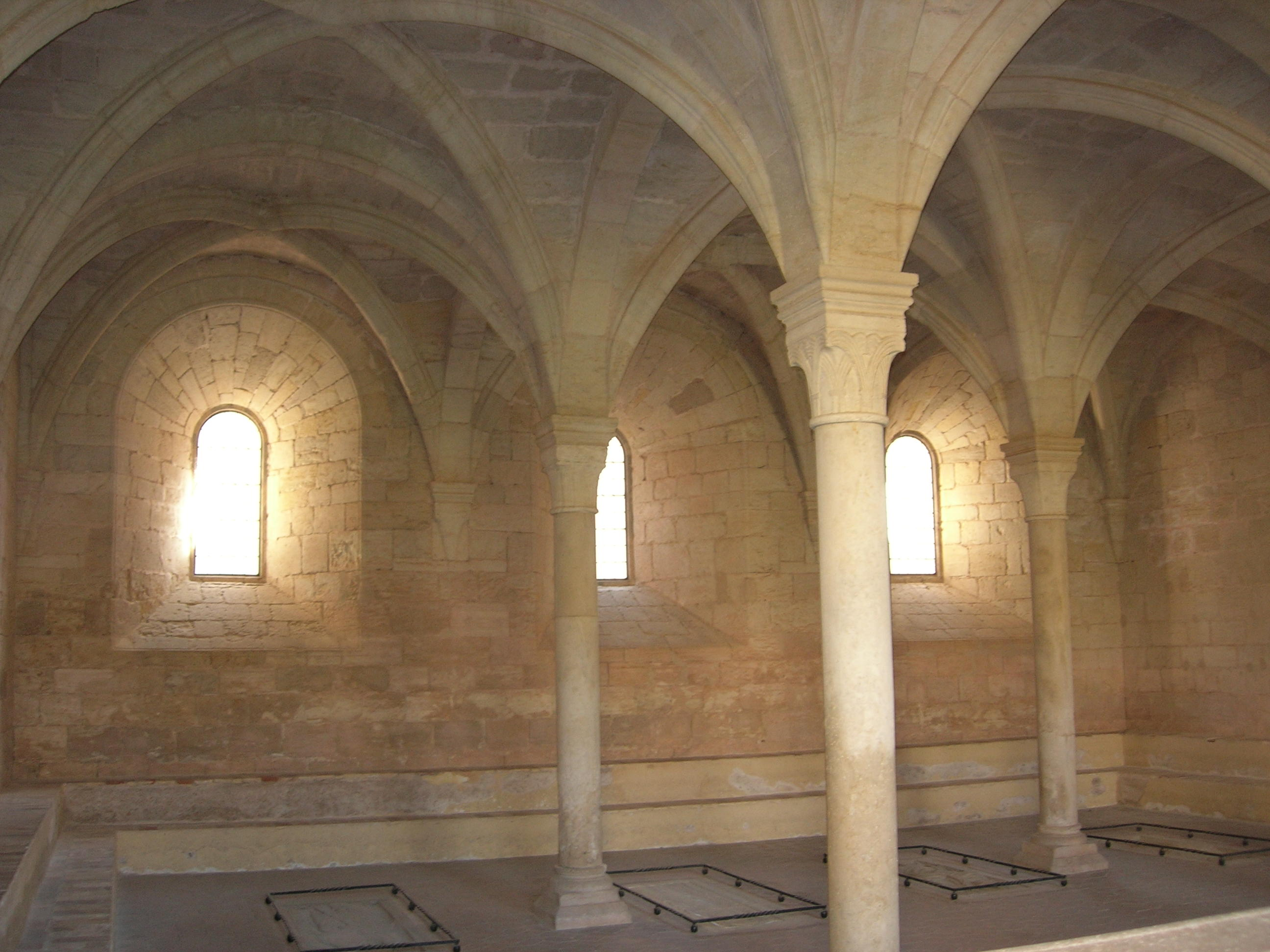 Monastère de Santes Creuses, Catalogne, Espagne.